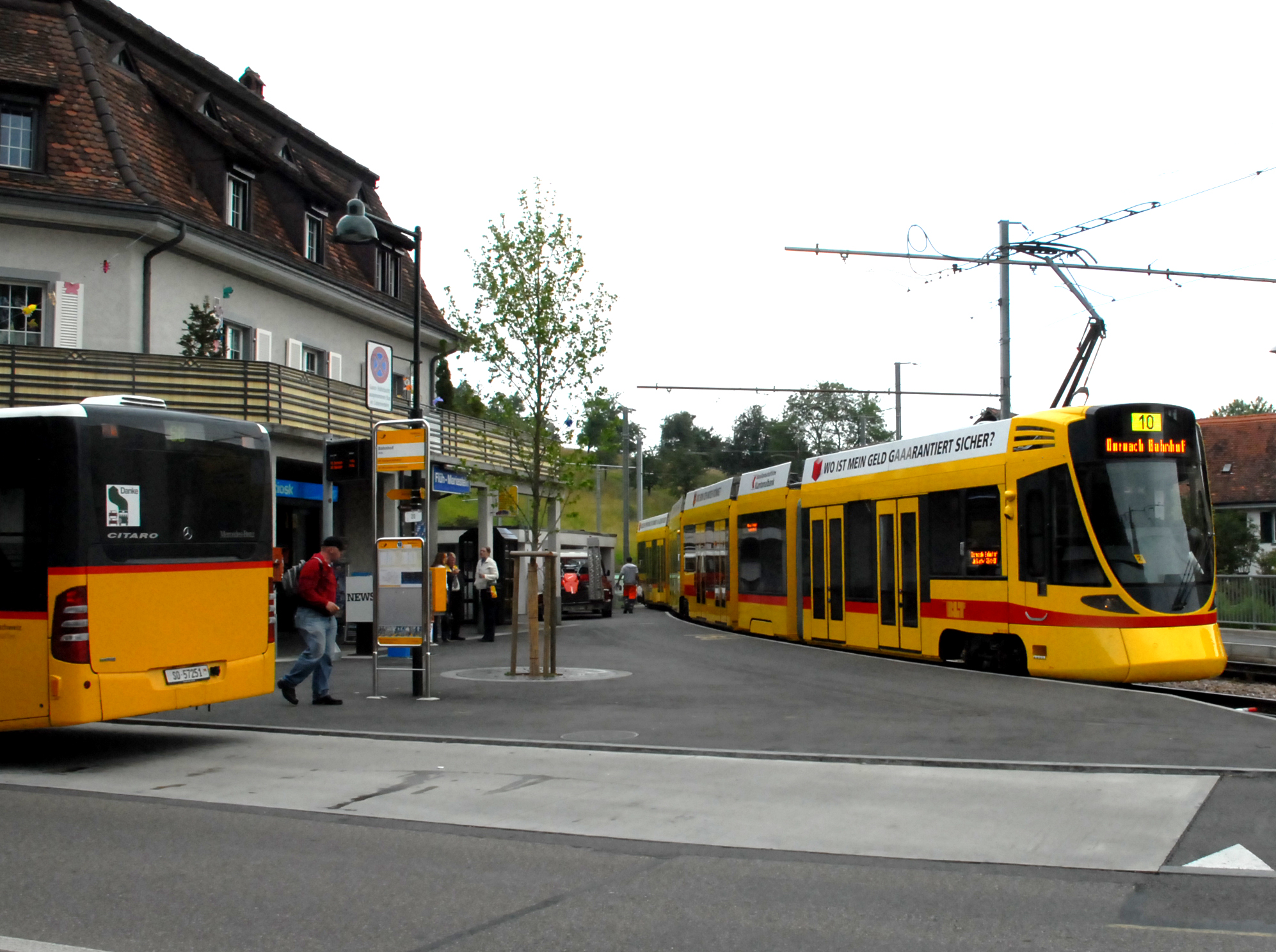 Baselland Transport (BLT) tram van het Stadler Rail type Be 6/10 nr: 152 / Tango als lijn 10 op 23 juni 2009 te Flüh bahnhof